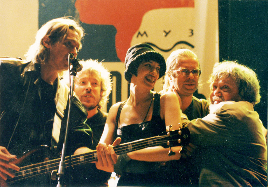 Лосев Макаревич Гребенщиков Соловьев